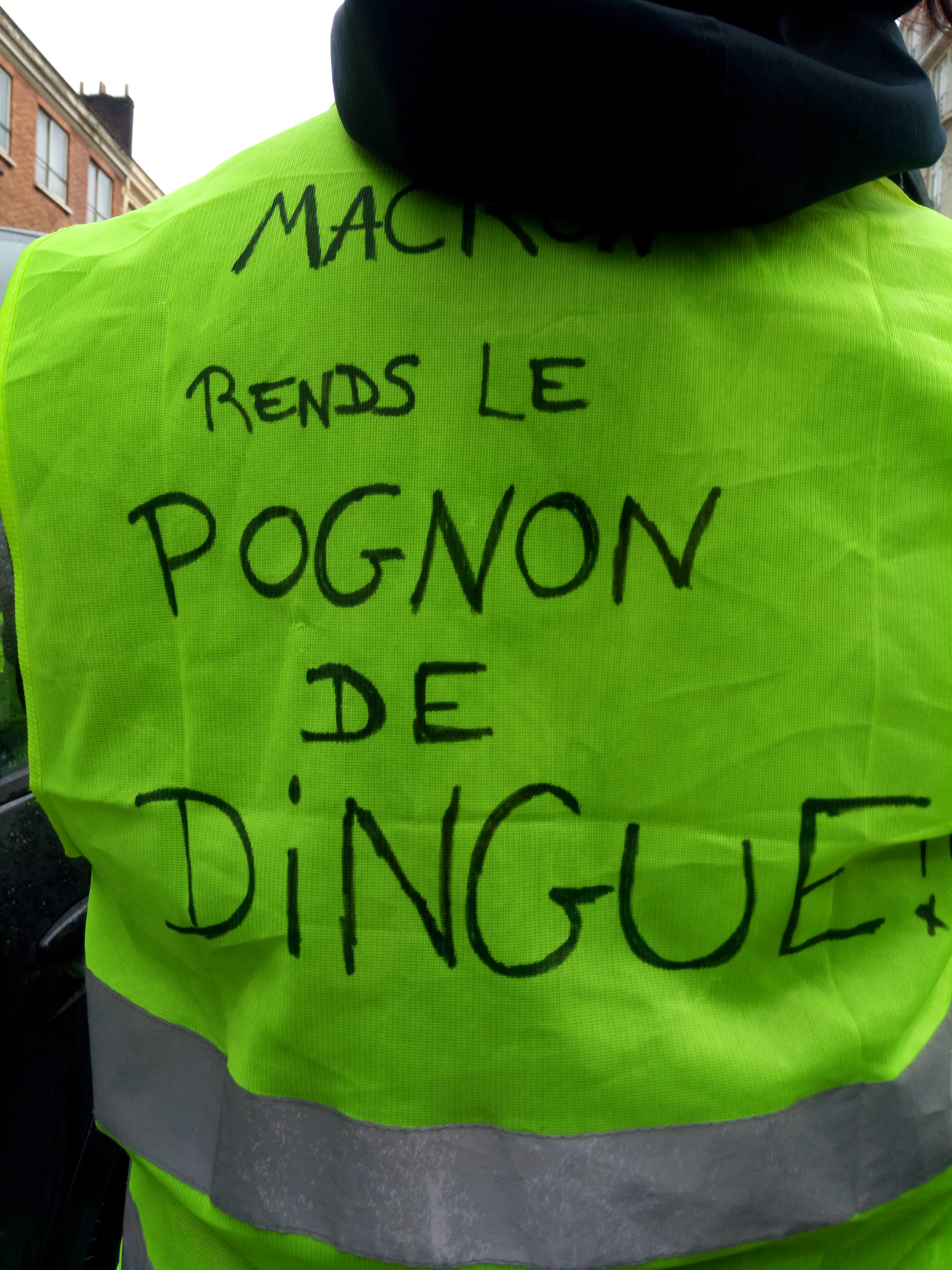 MACRON RENDS LE POGNON DE DINGUE